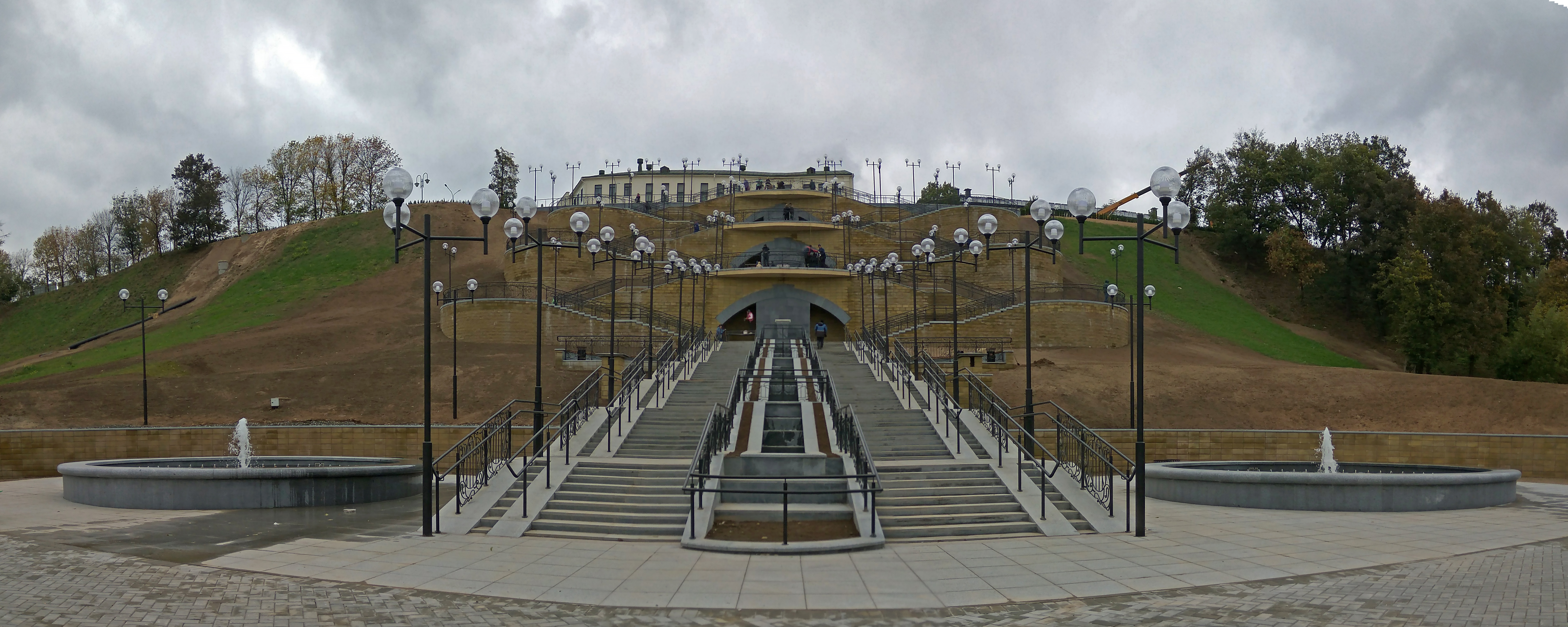 Магілёў. Лесвіца ў Падміколле